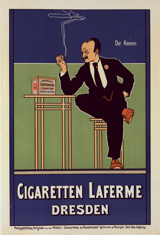 Affiche allemande pour les "Cigarettes Laferme Dresden"